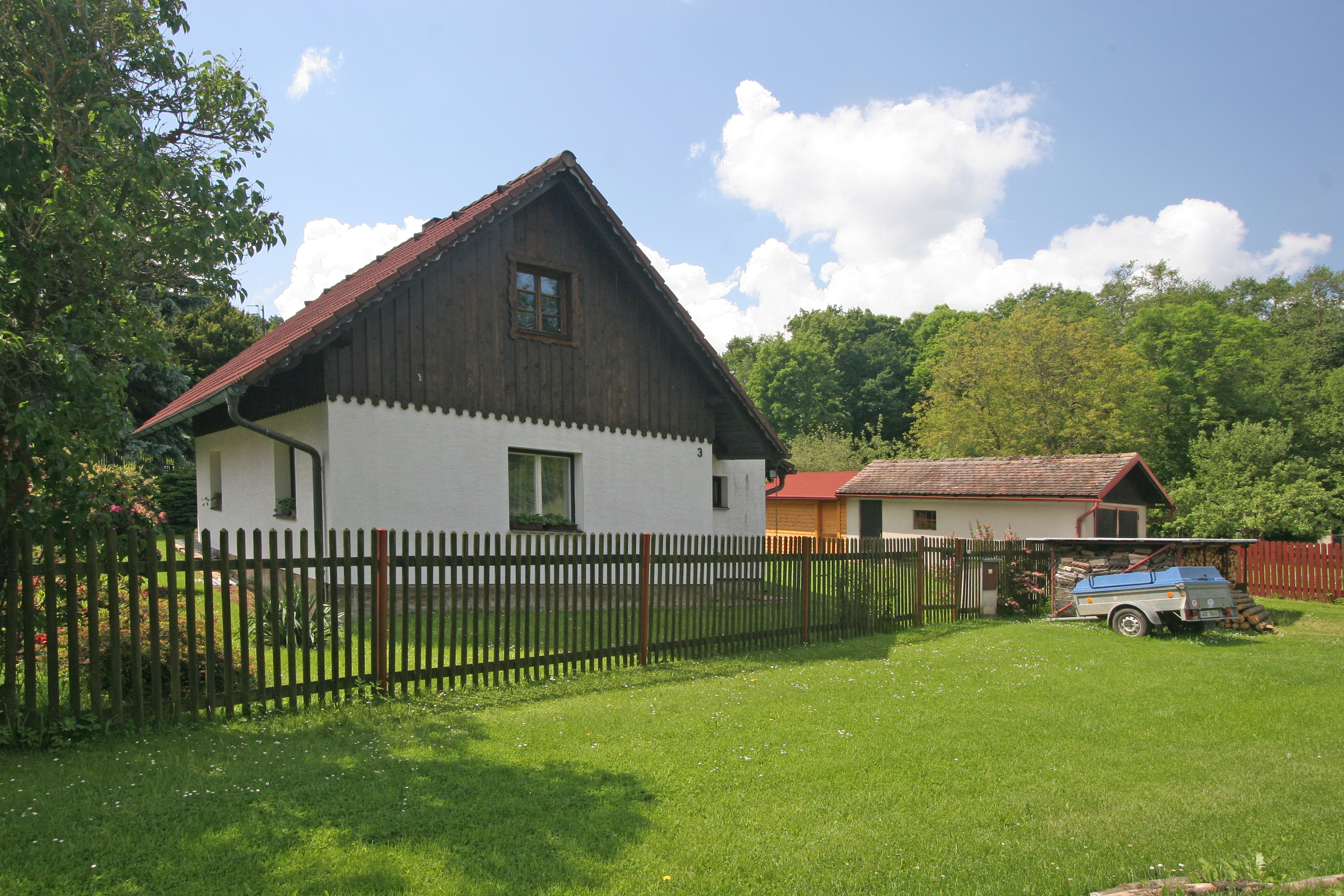 Kochánovice čp. 3